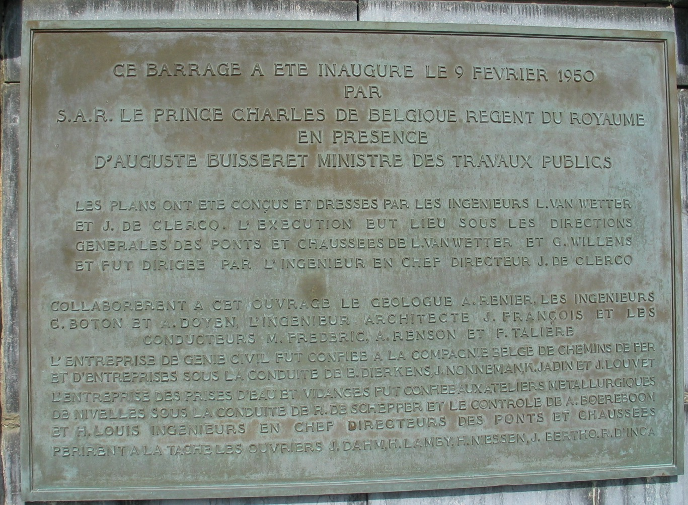 Gedenktafel zur Einweihung der Wesertalsperre bei Eupen